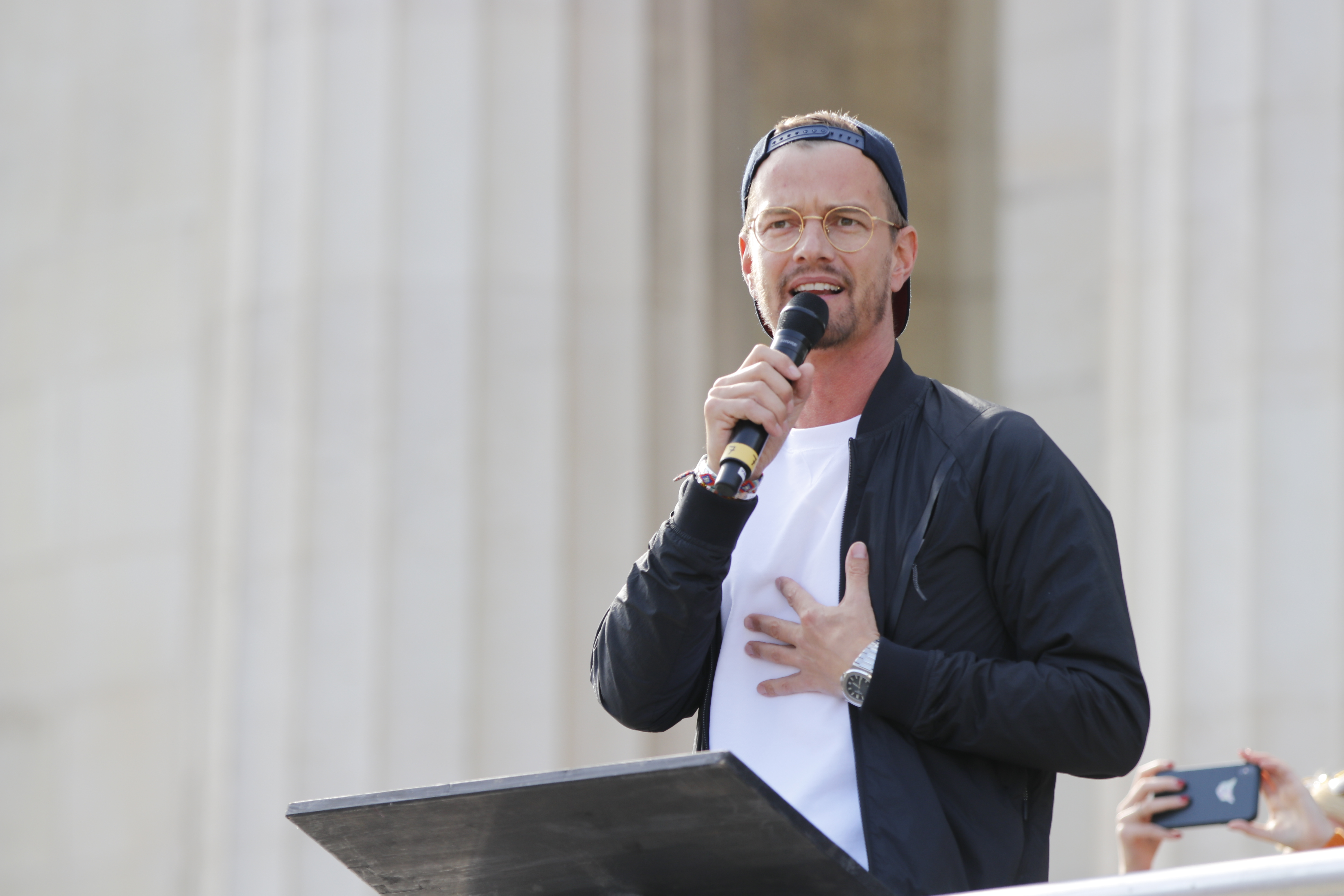 Joko Winterscheidt auf der Abschlusskundgebung von Fridays for Future München am 2019-09-20 auf dem Königsplatz.